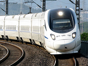 和谐号CRH5型电力动车组